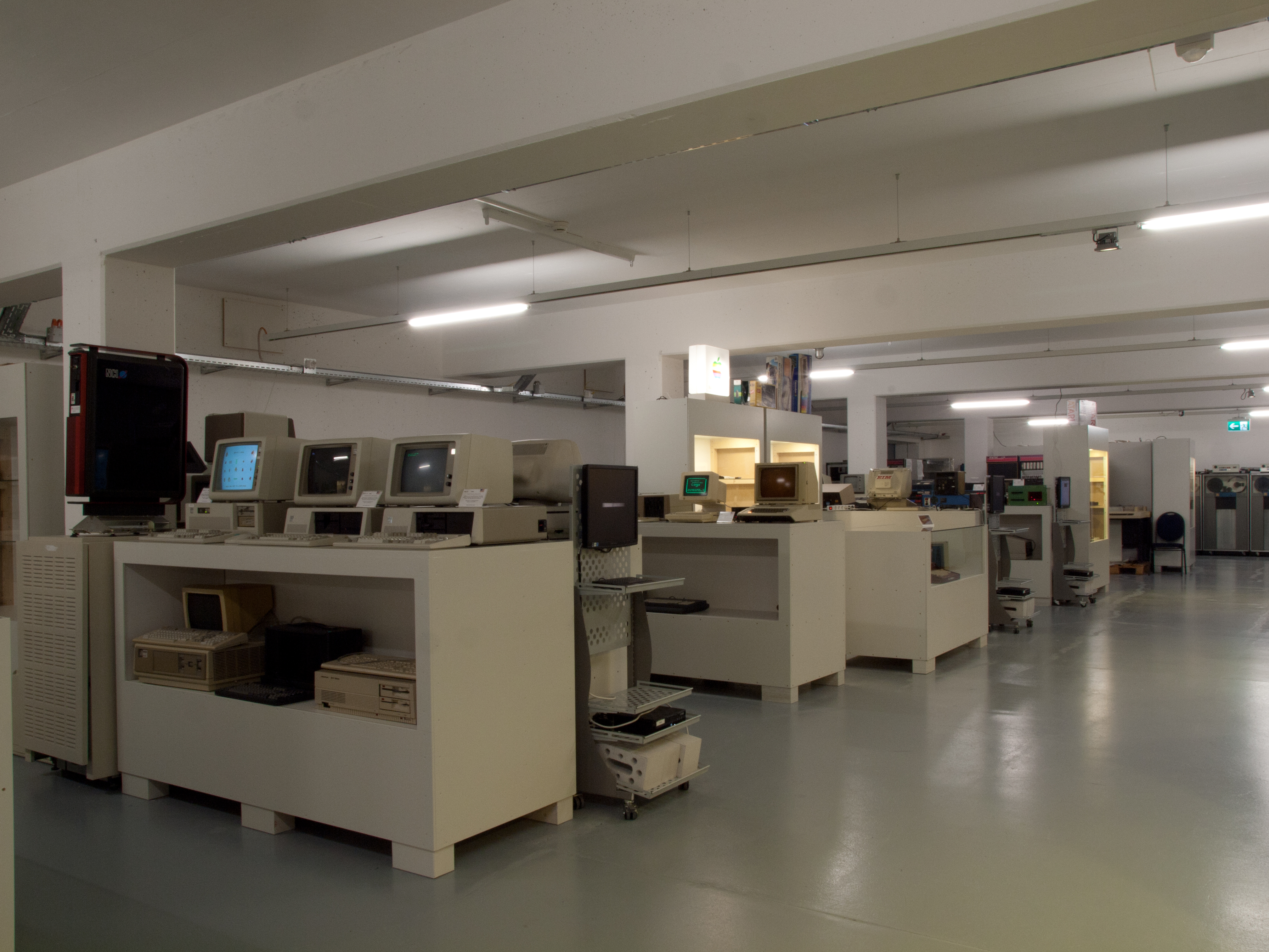 Innenaufnahmen aus dem Mueseum ENTER in Solothurn